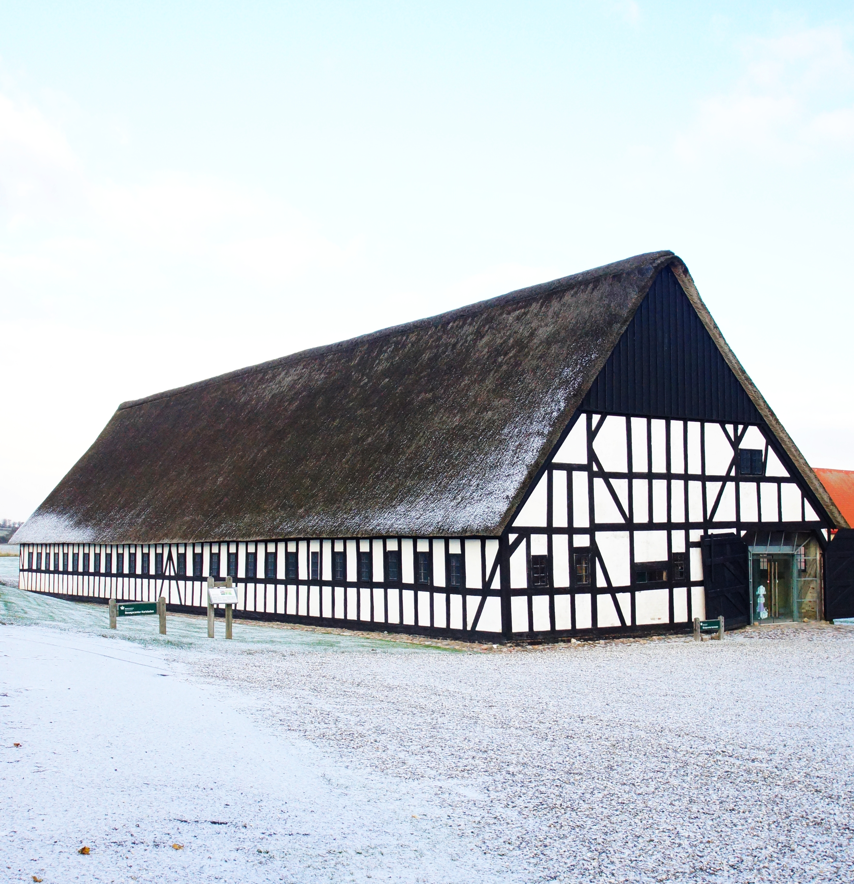 Karlsladen vinter 2016